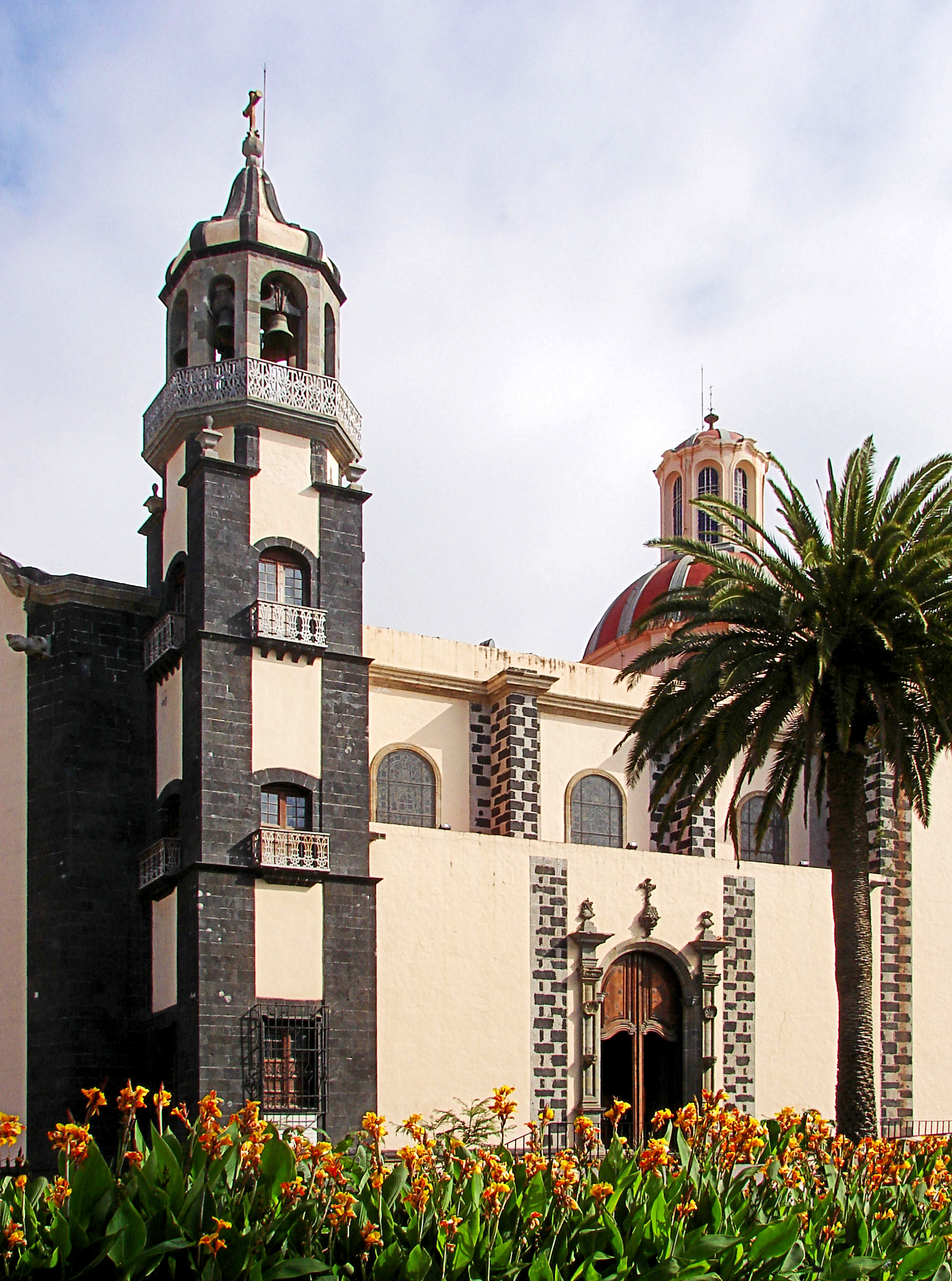 Fachada sur de la Iglesia de la Concepcion de La Orotava